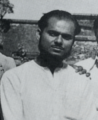 Ustad Khadem Hossain Khan (1922-1992) Bangladeshi musician.